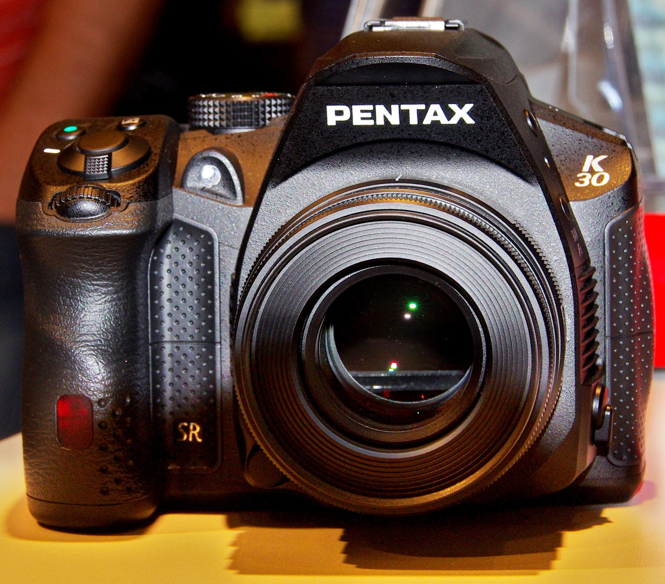 Pentax K-30 mit dem DA 50mm